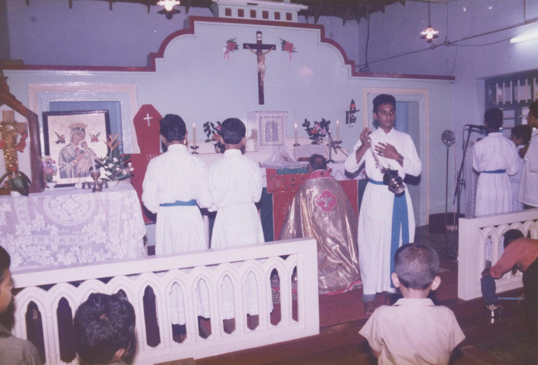 Syro-Malankarische Messe, 1998, Indien